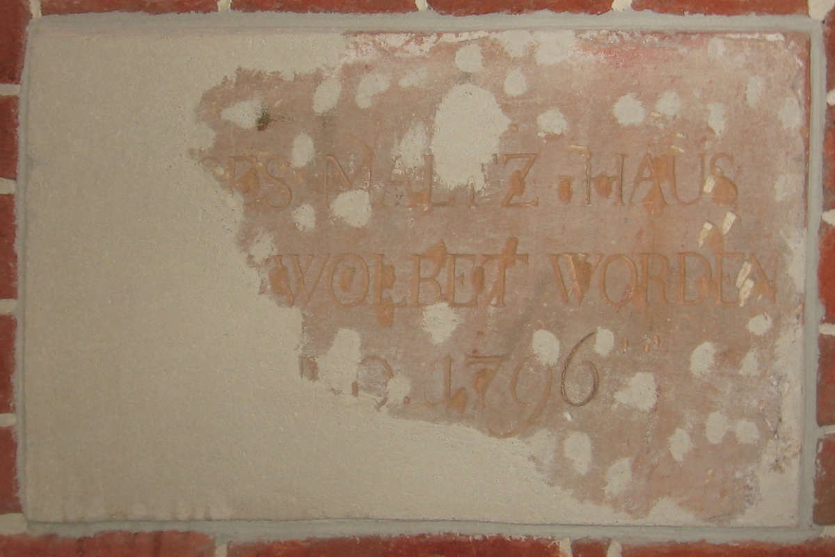 The Granary - La Suite Hotel, ul. Mennicza, Wrocław odrestaurowana tablica kamienna ze słodowni